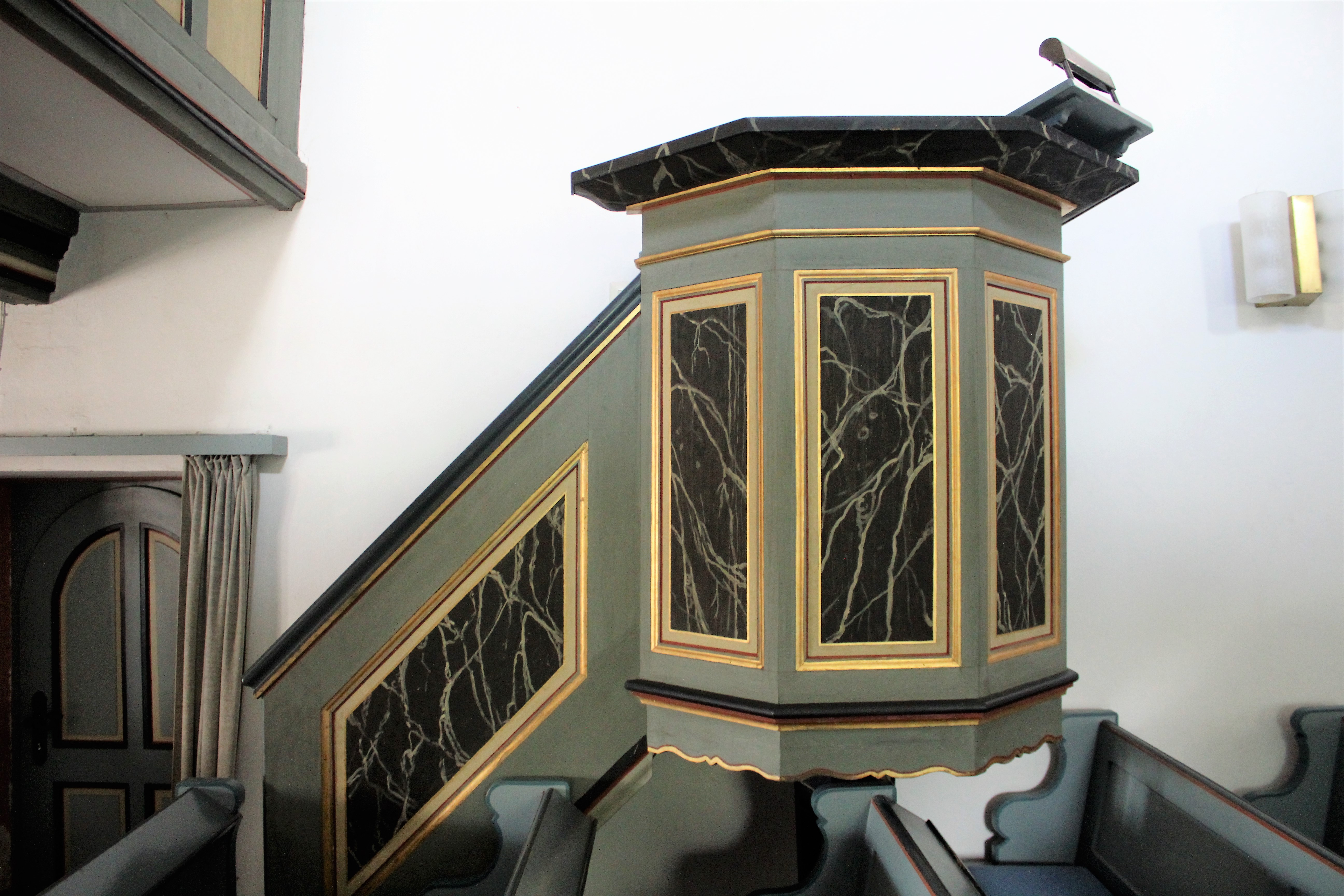 Ev. Kirche Nauborn, Wetzlar, Lahn-Dill-Kreis, Hessen, Deutschland